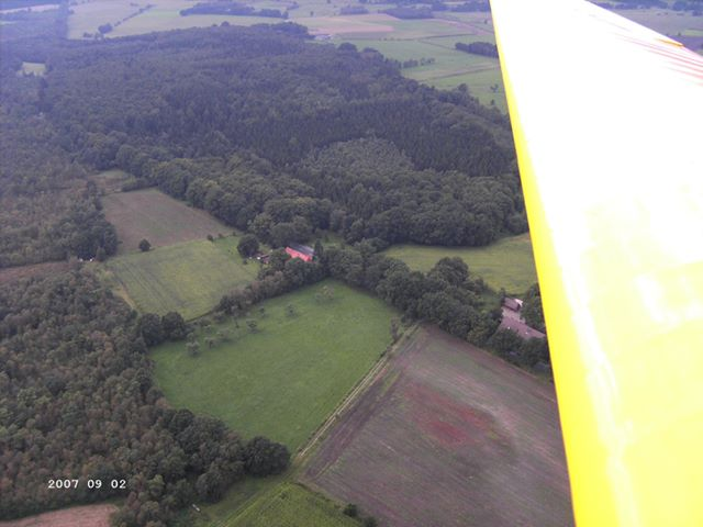 Die ehemalige Waldschänke